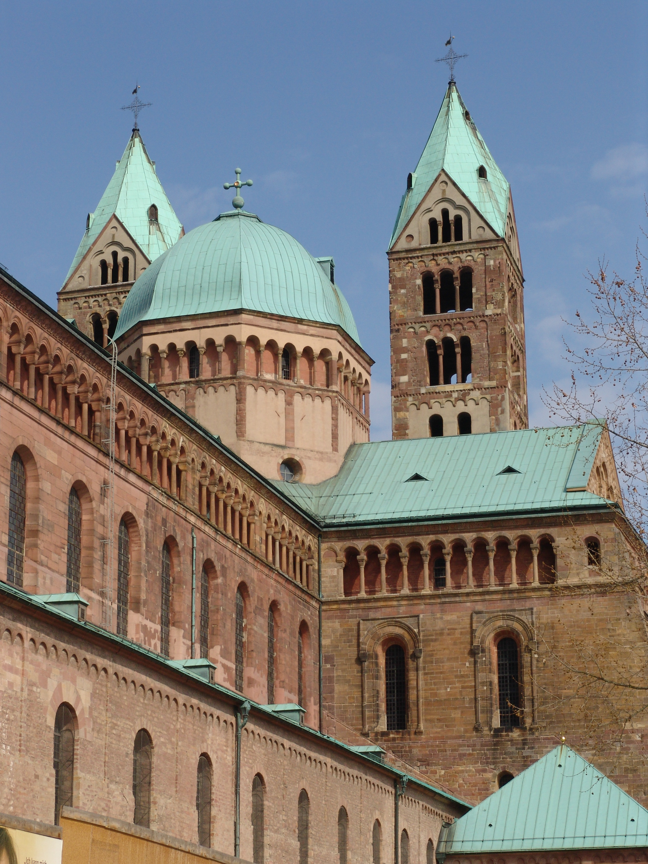 Der Speyerer Dom im Frühjahr